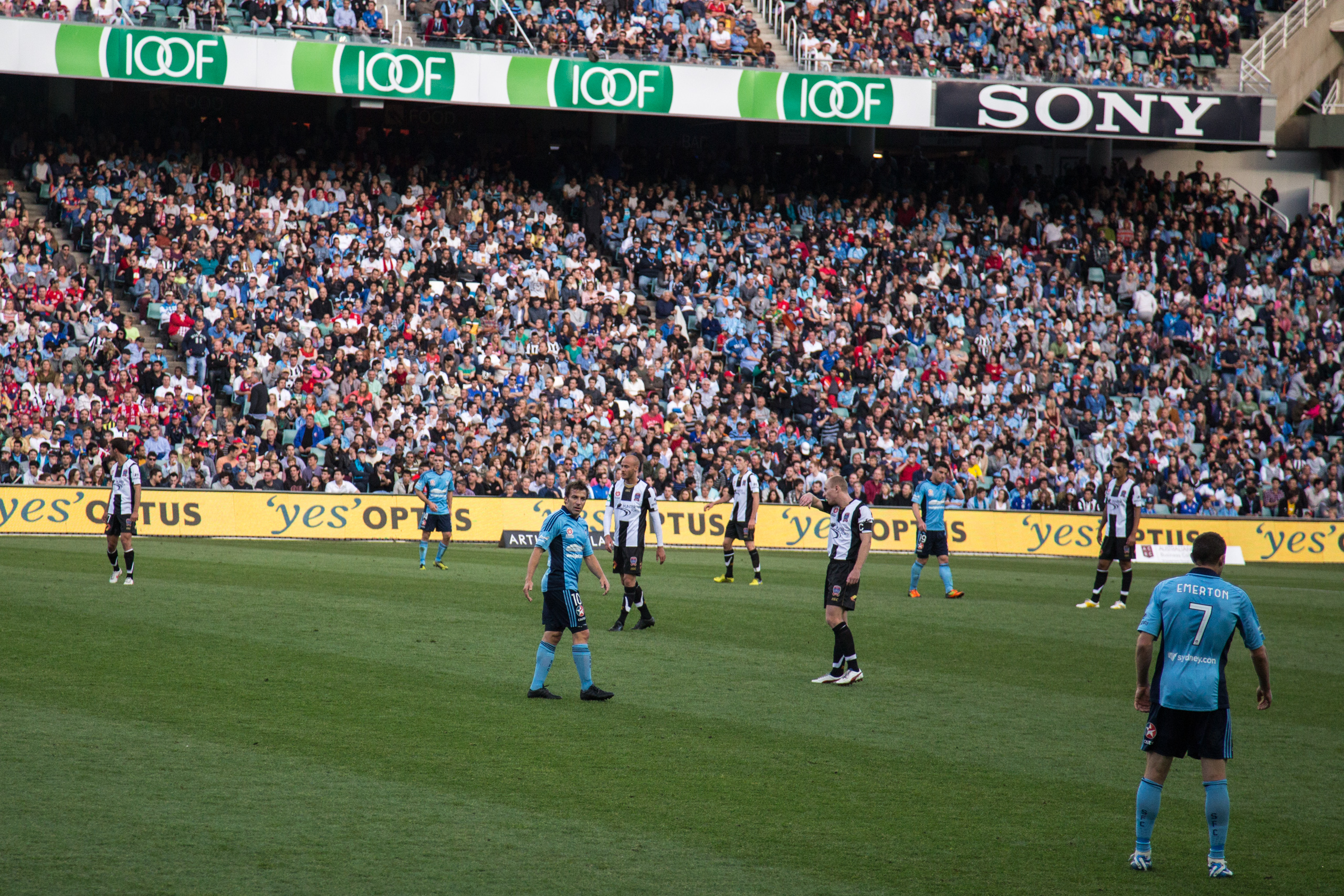 Alessandro Del Piero nella partita tra Sydney FC e Newcastle Jets.